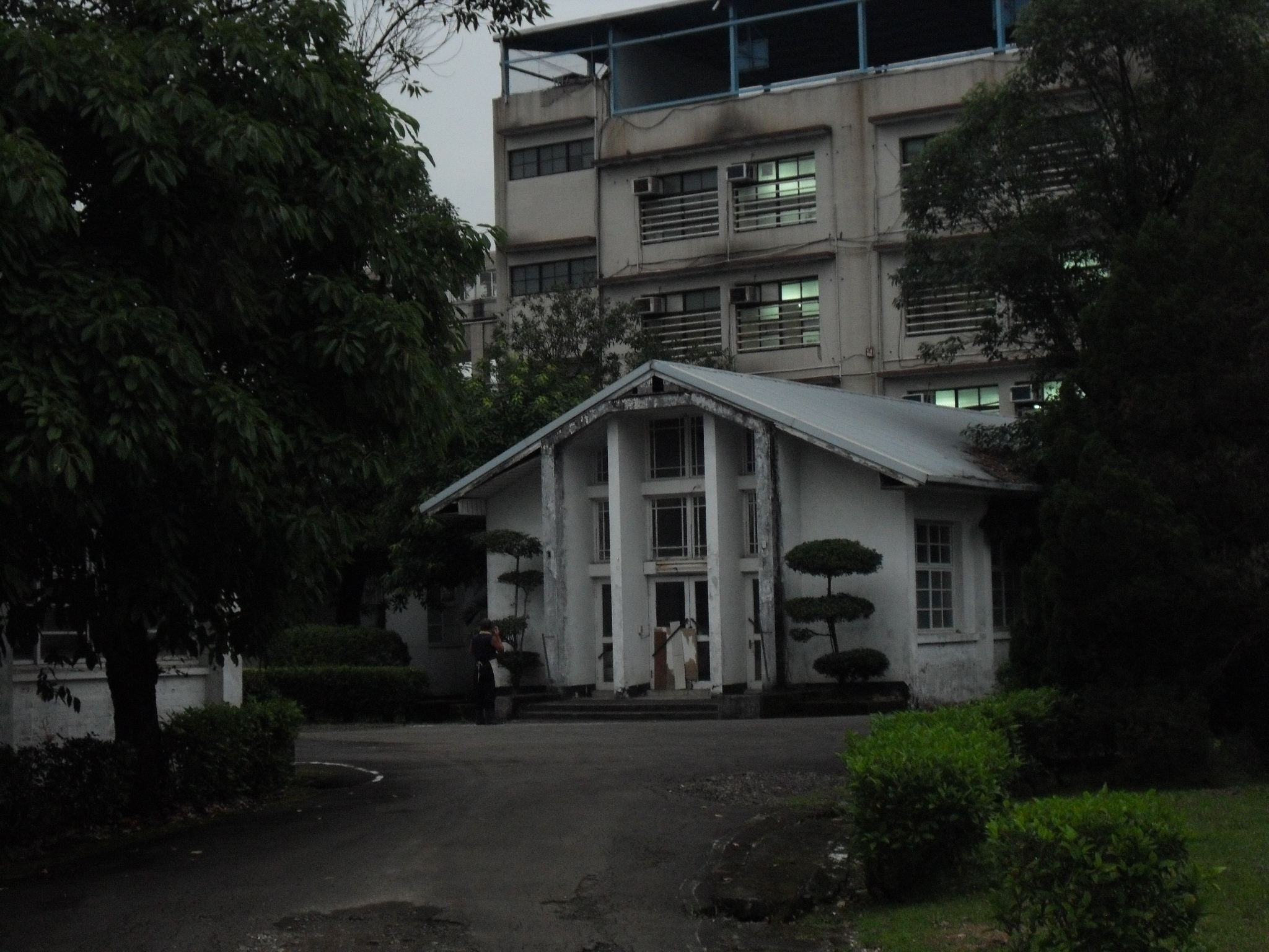 Bân-lâm-gú: 佇臺北木柵路一段的中國國民黨革命實踐研究院院舍。